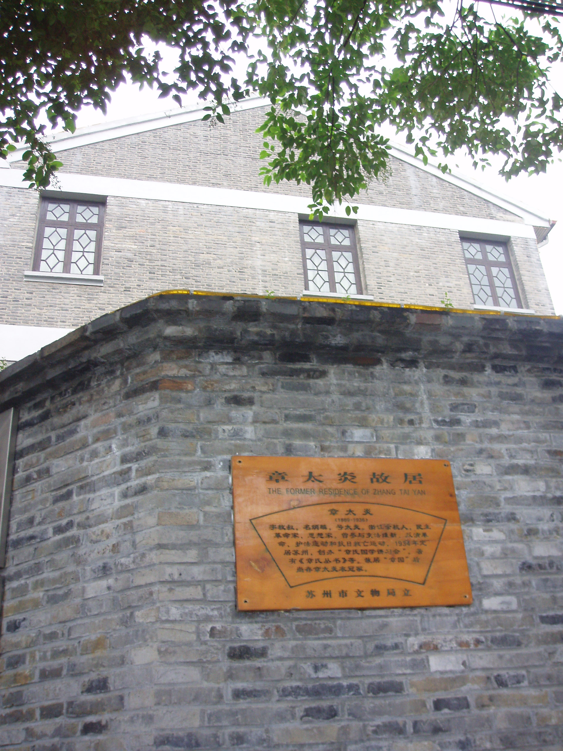 苏州章太炎故居.